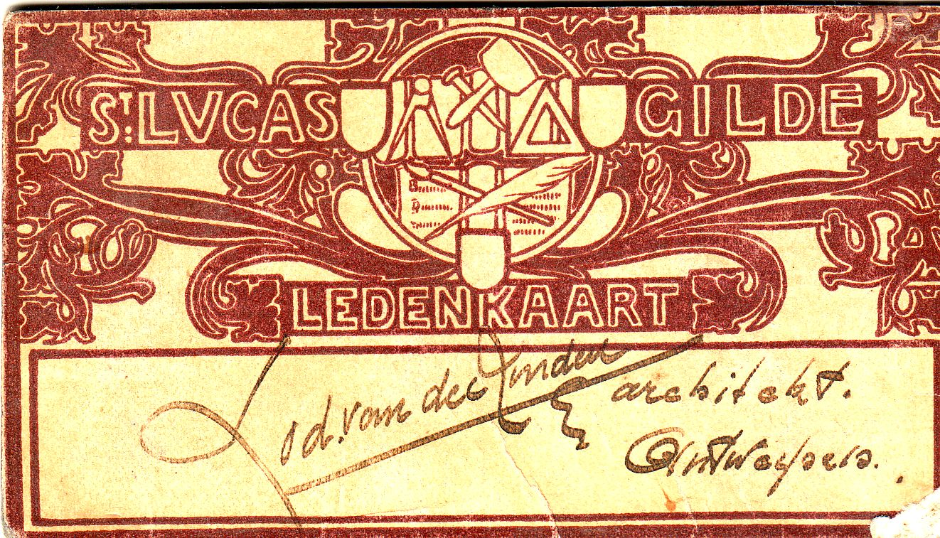 Mitgliedskarte der St. Lukas Gilde Antwerpen 1908 Rückseite